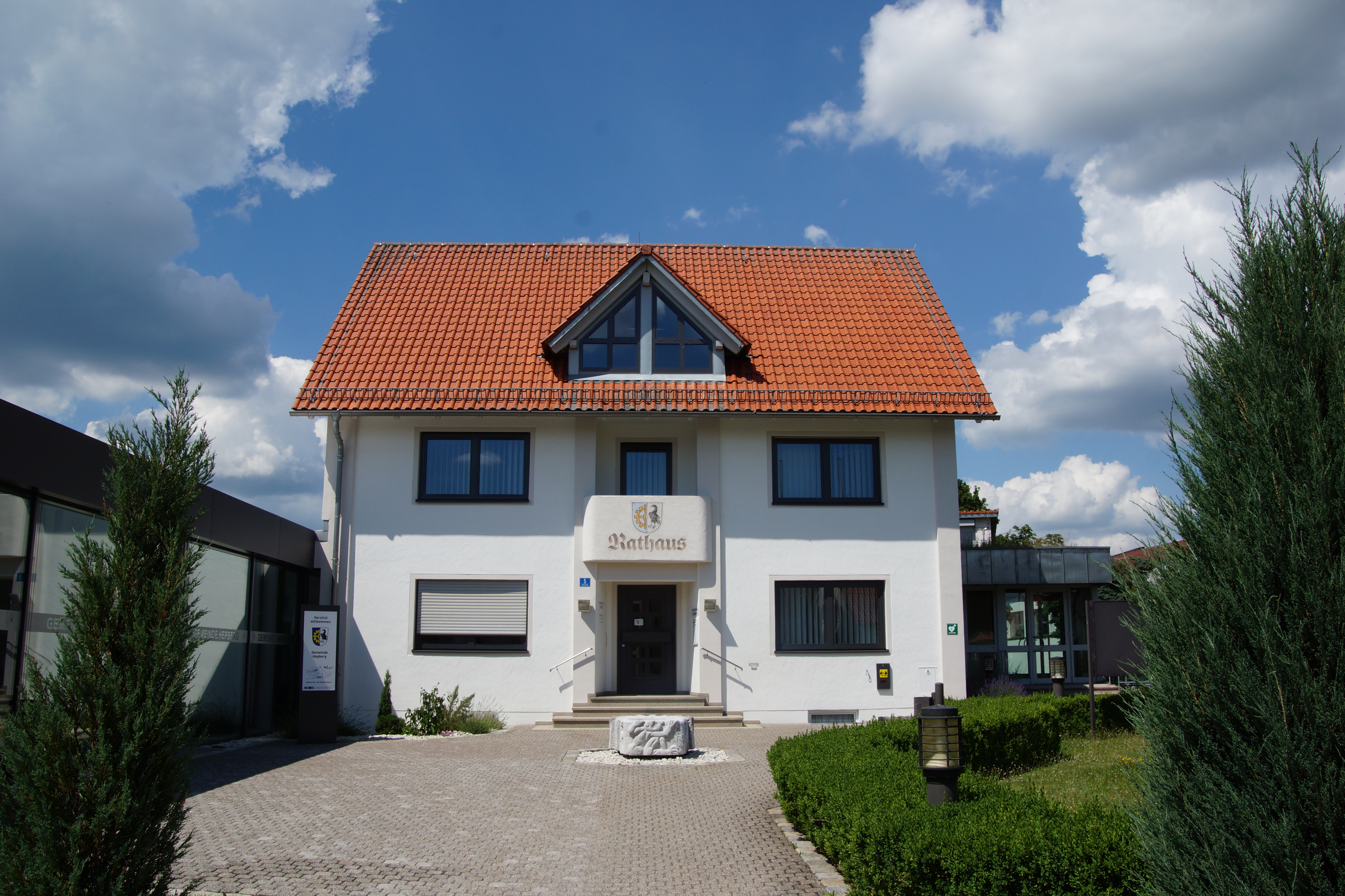 Hepberg bei Ingolstadt